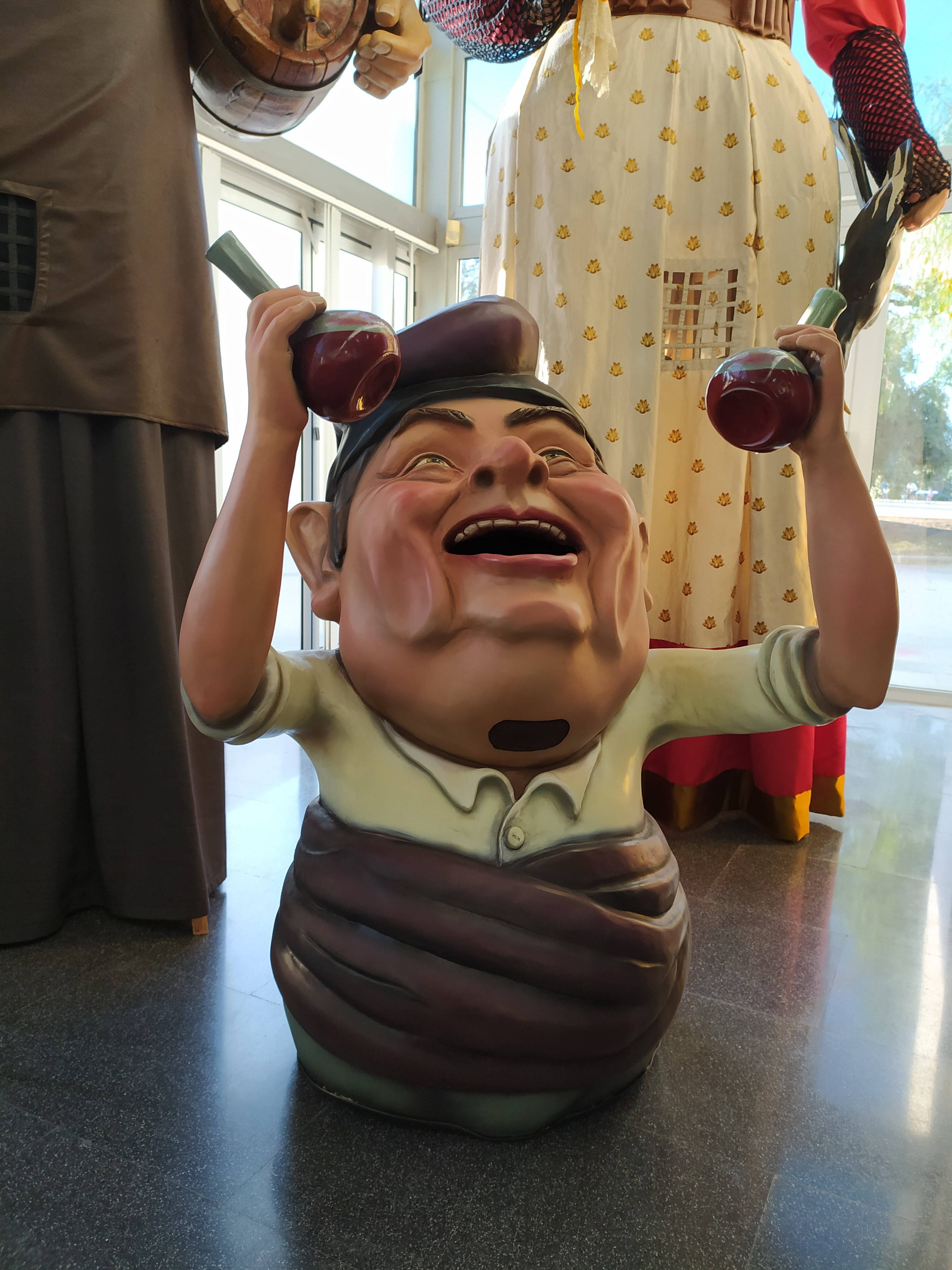 El nan Porronet d'Abrera a l'exposició de la Festa Major virtual d'Abrera de 2020.